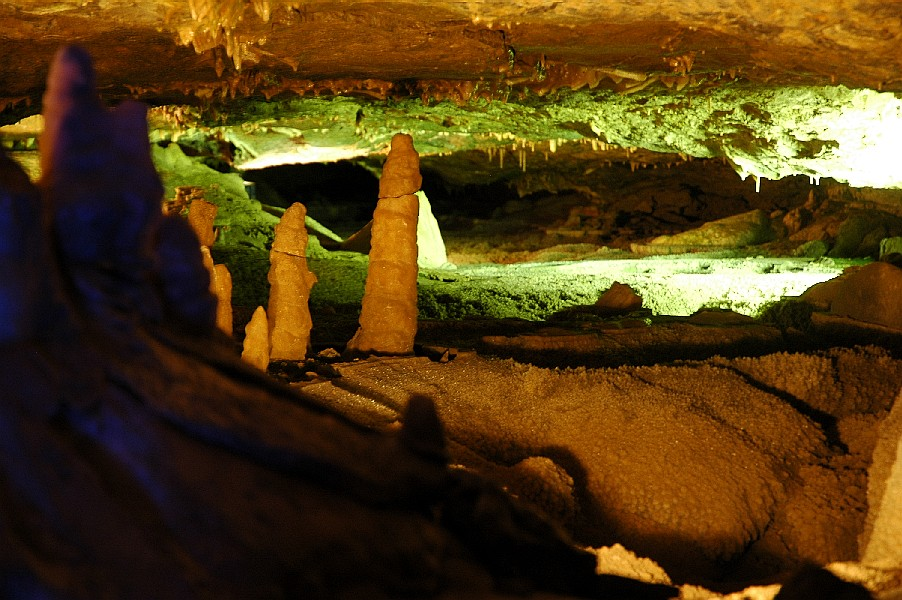 Schillat-Höhle im Süntel (Deutschland) - hinterer, nicht für die Besucher zugänglicher Teil